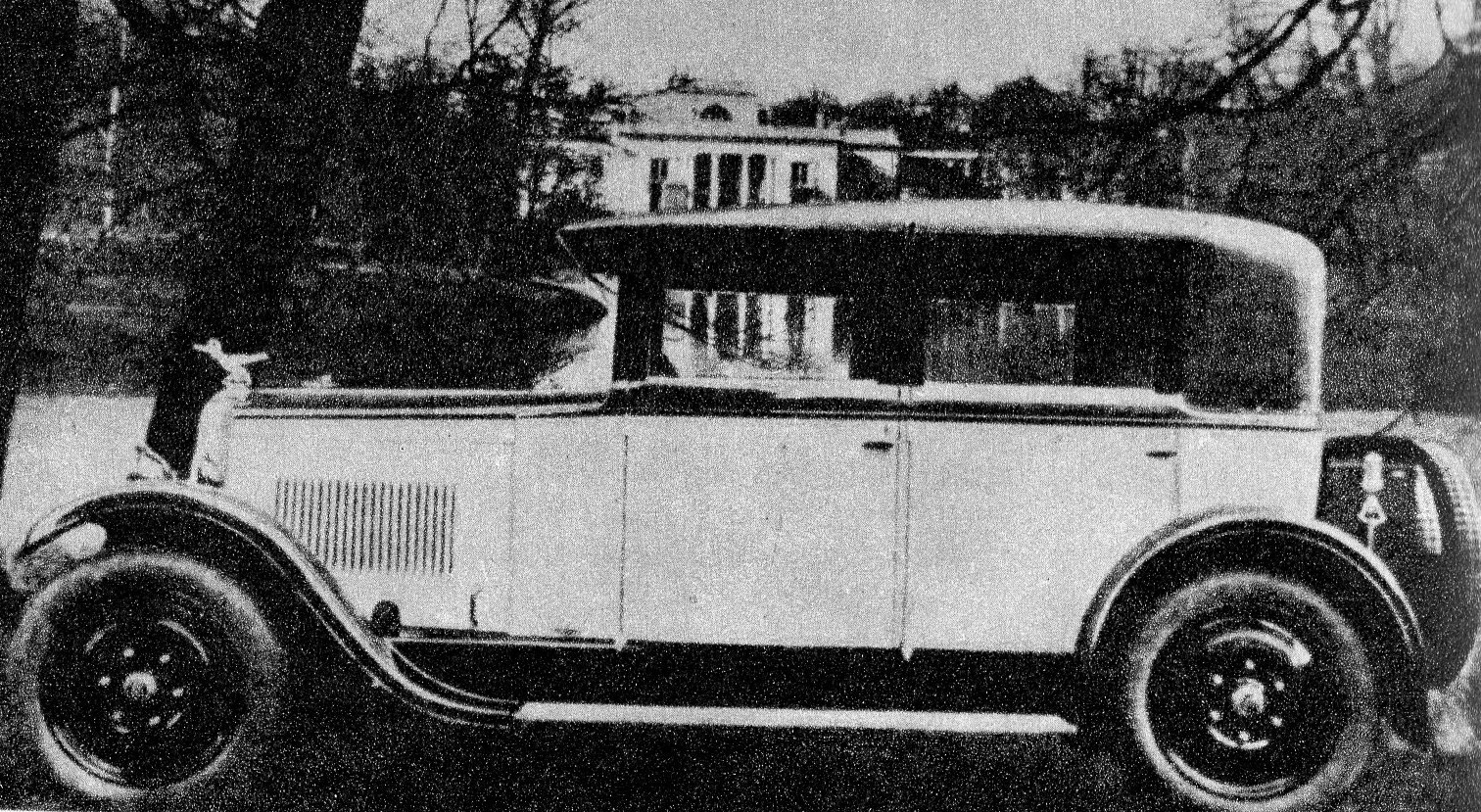 Prototyp Ralfa-Stetysza w Łazienkach warszawskich w 1928r.